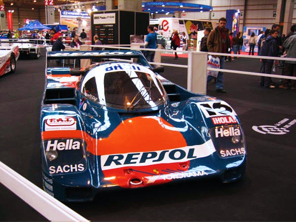 Coche de carreras en el Motor Show de Zaragoza.